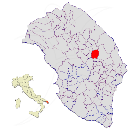 Il territorio del comune di Martano nella provincia di Lecce